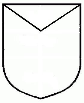 Escudo entado en jefe